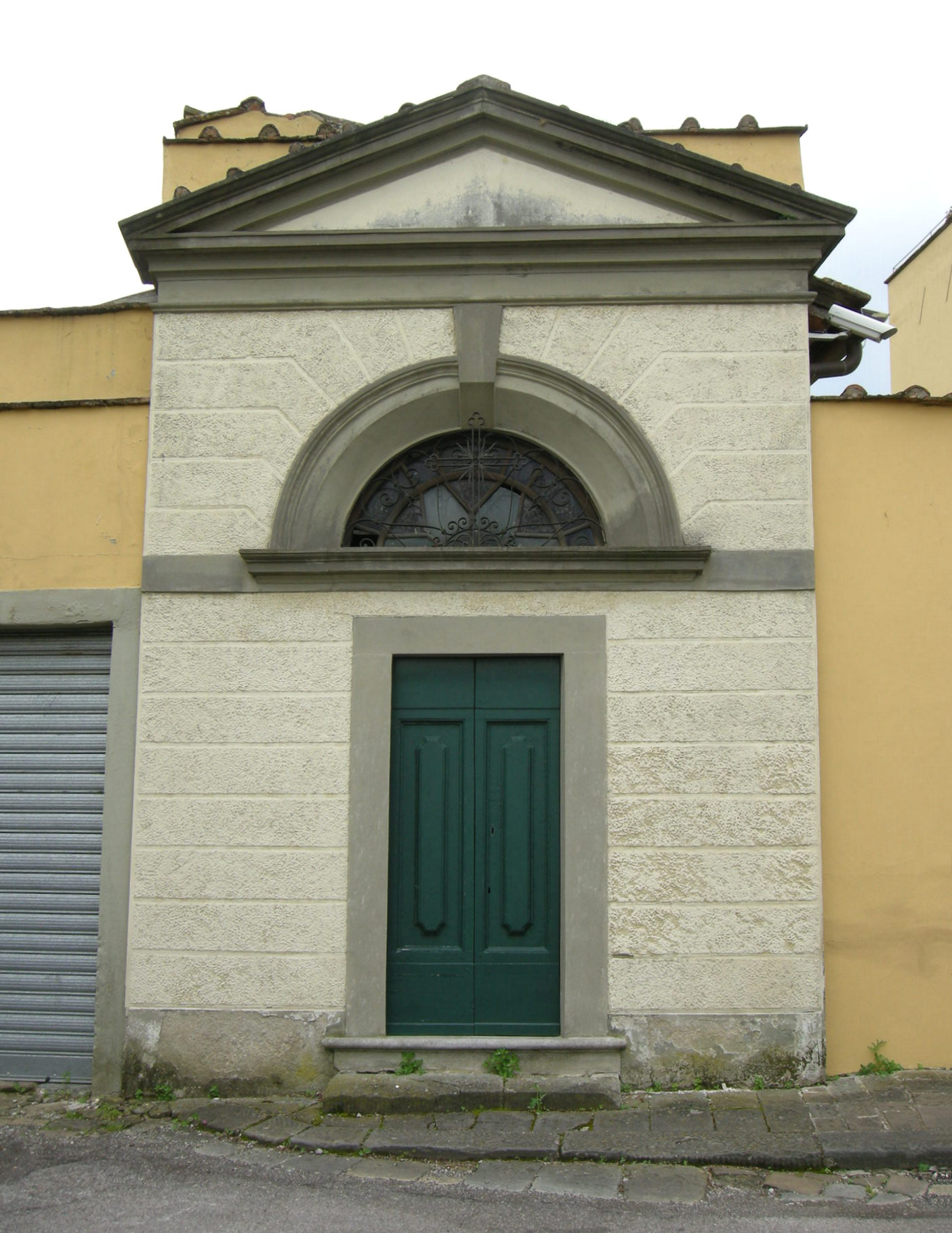 Piazza degli ugnanelli, cappellina